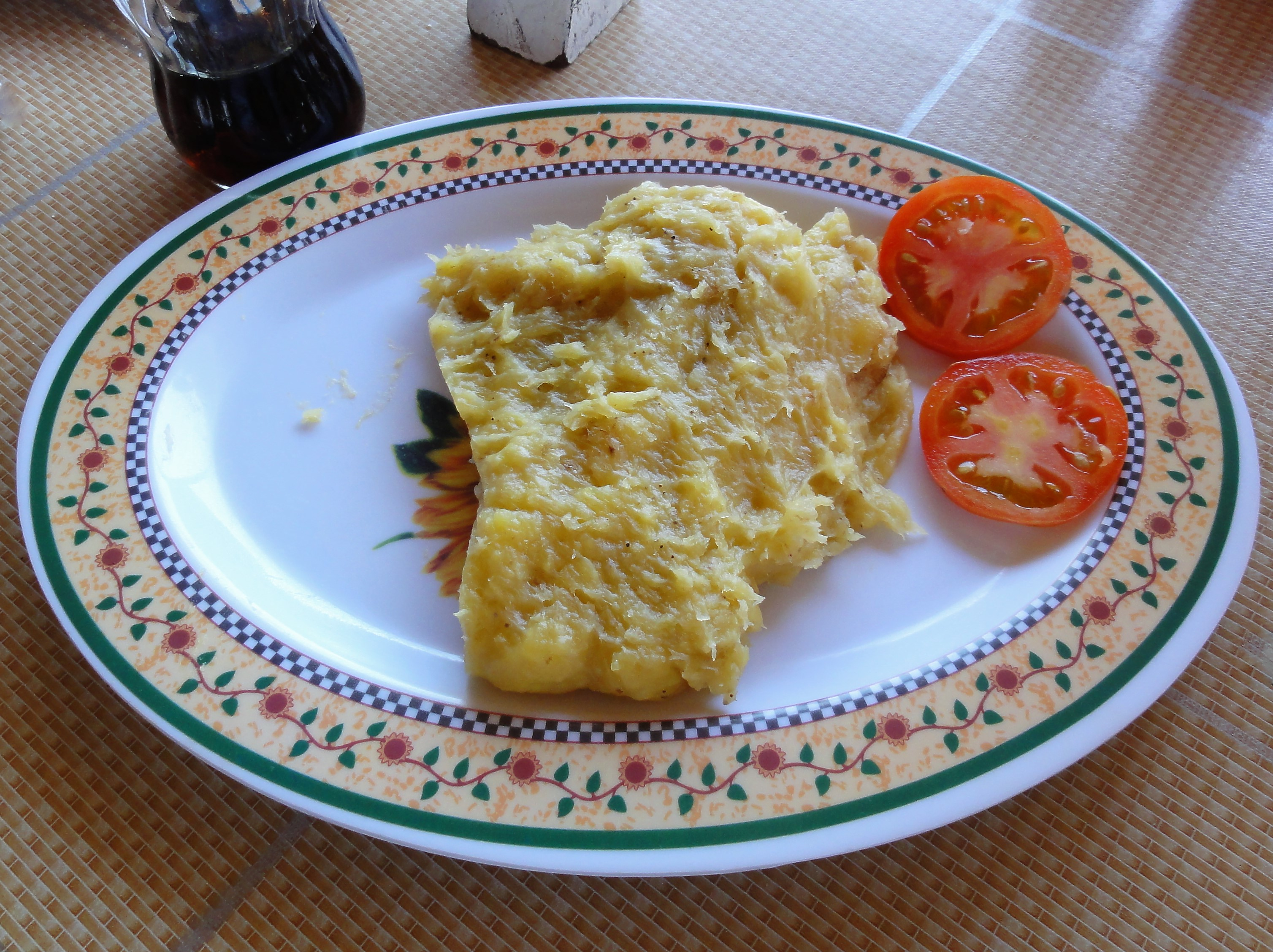 Matoke, garniert mit Tomatenscheiben.